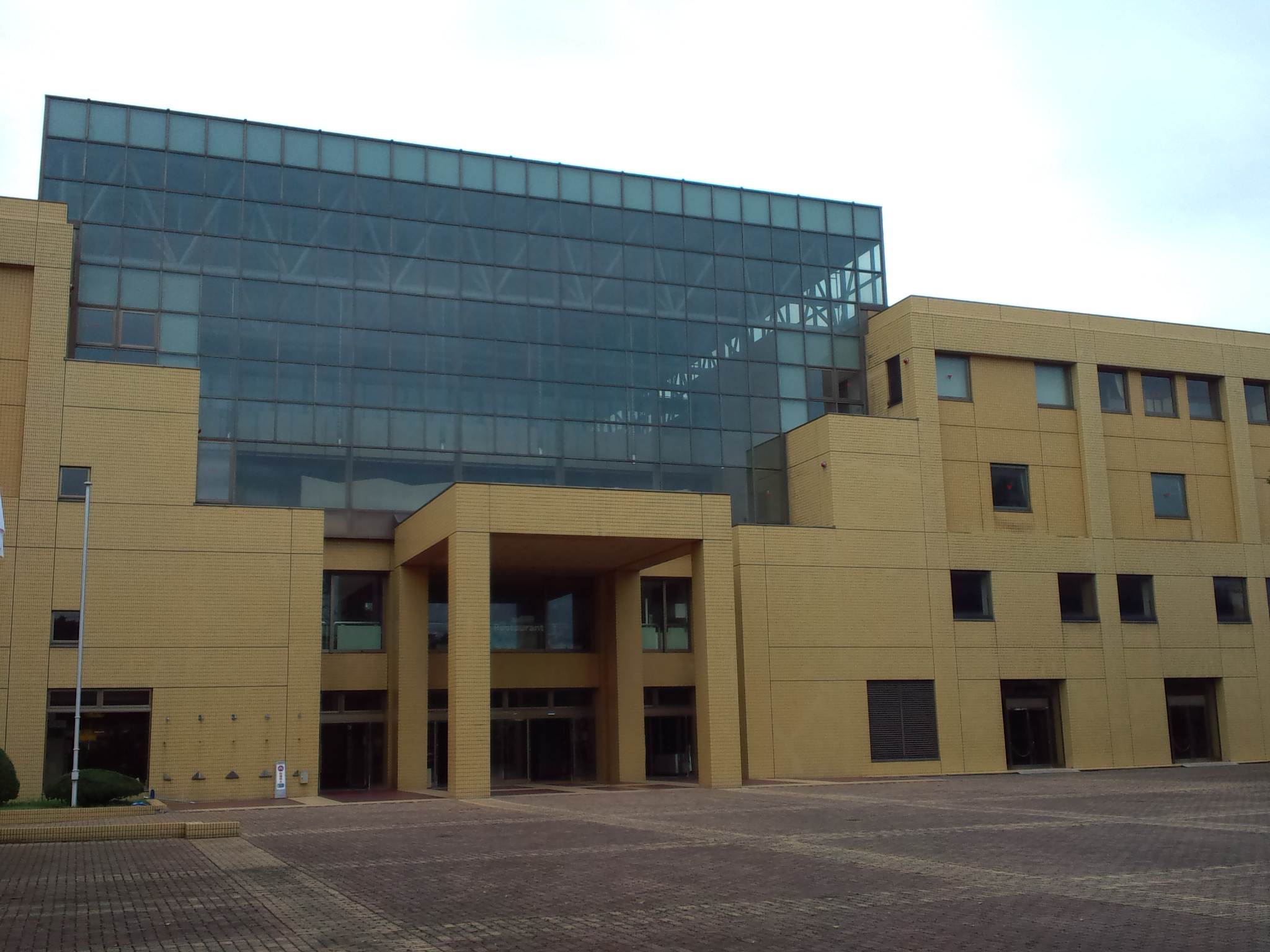 福井県福井市に所在する文化施設、フェニックス・プラザ。